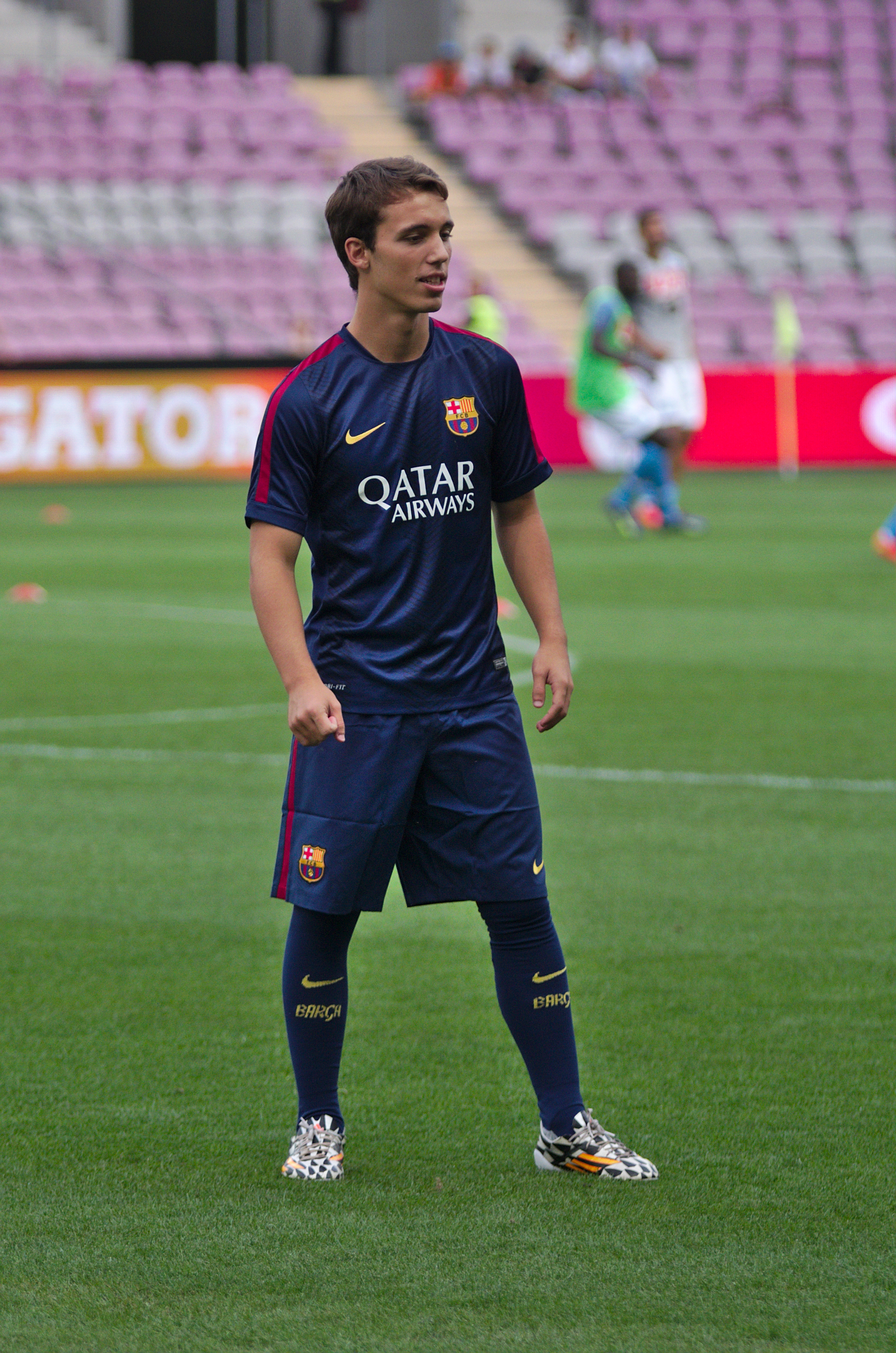 Barça - Napoli - 20140806 - Alejandro Grimaldo